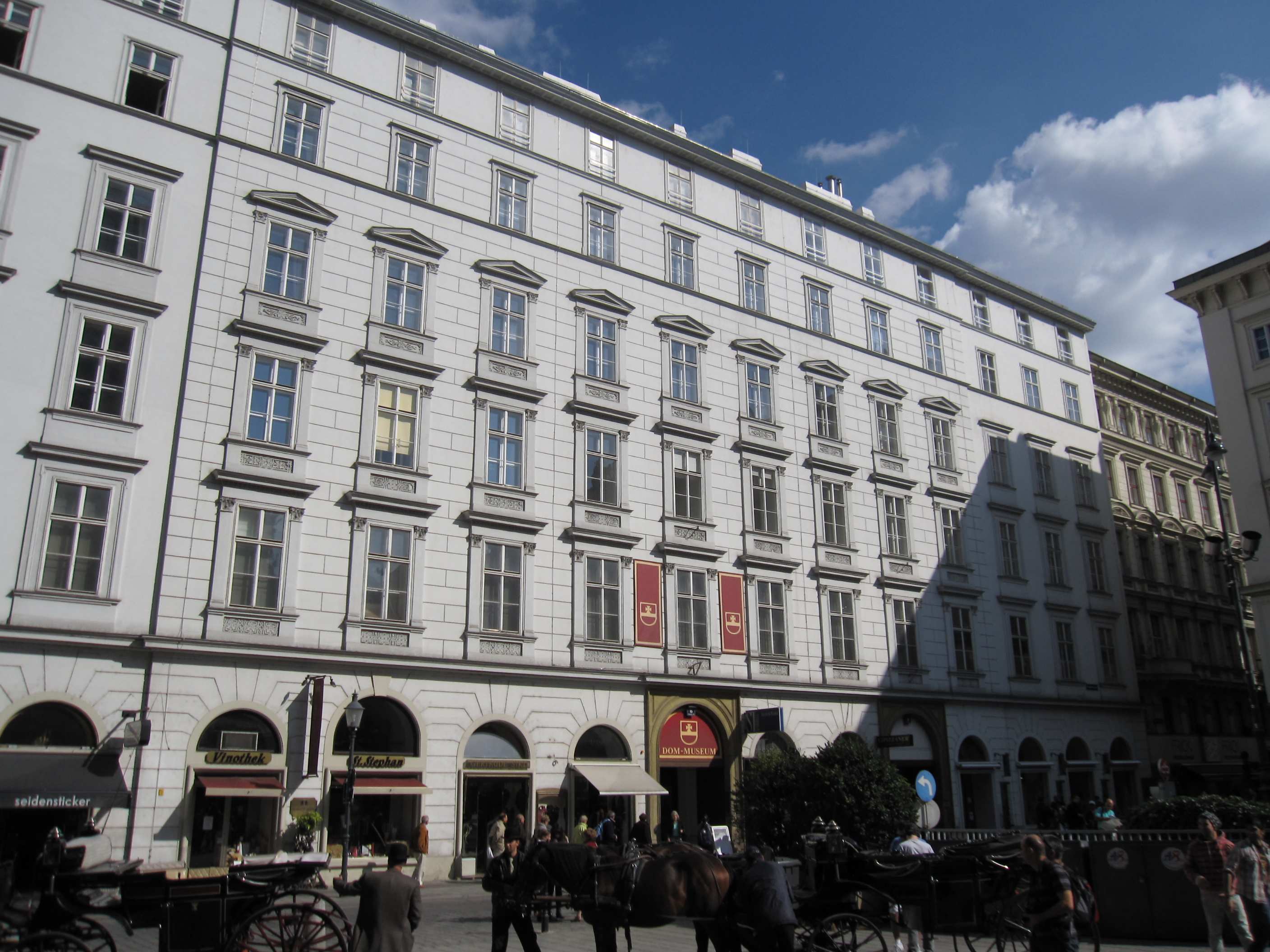 Dom- und Diözesanmuseum